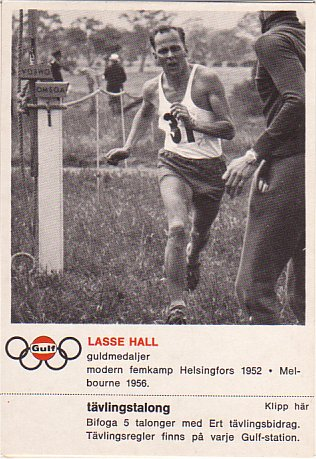 Lars Hall